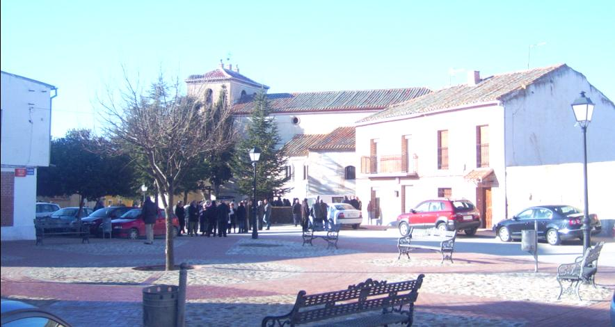 Plaza de la Constitución en la localidad abulense de Langa